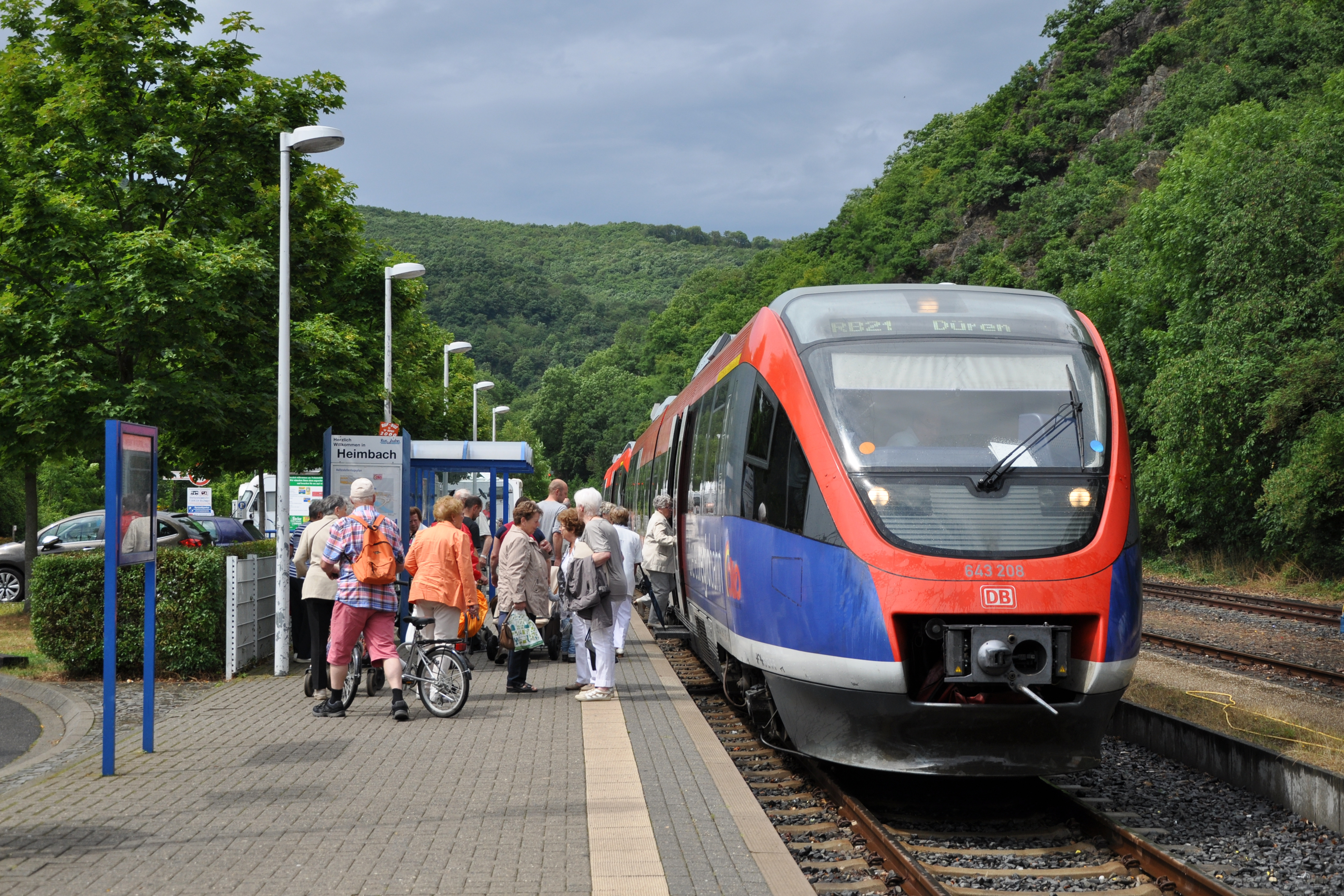 643 208 / DB Euregiobahn // Heimbach / 6. Juli 2014